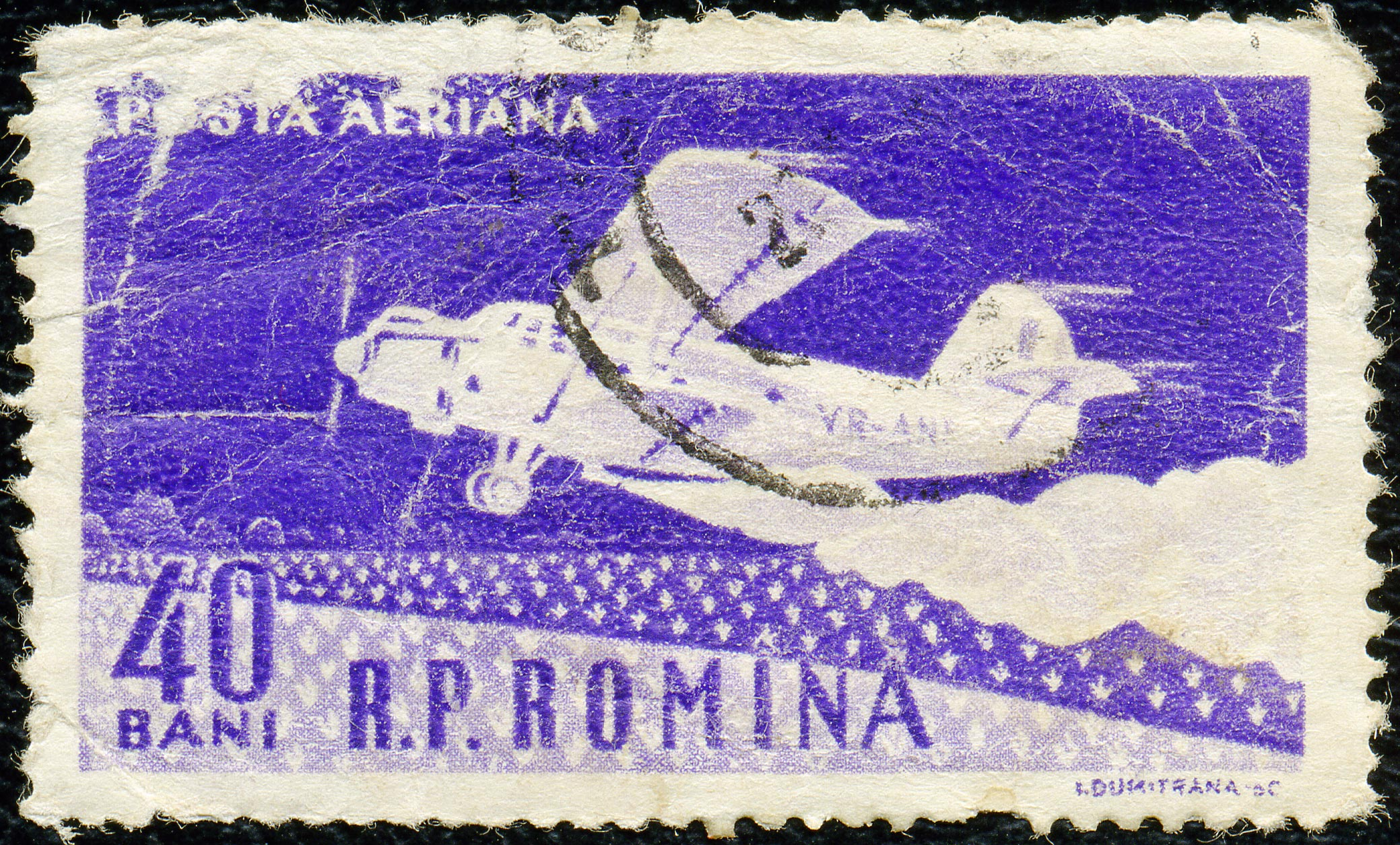 Stamp of Romania. Posta Romana. Самолёт